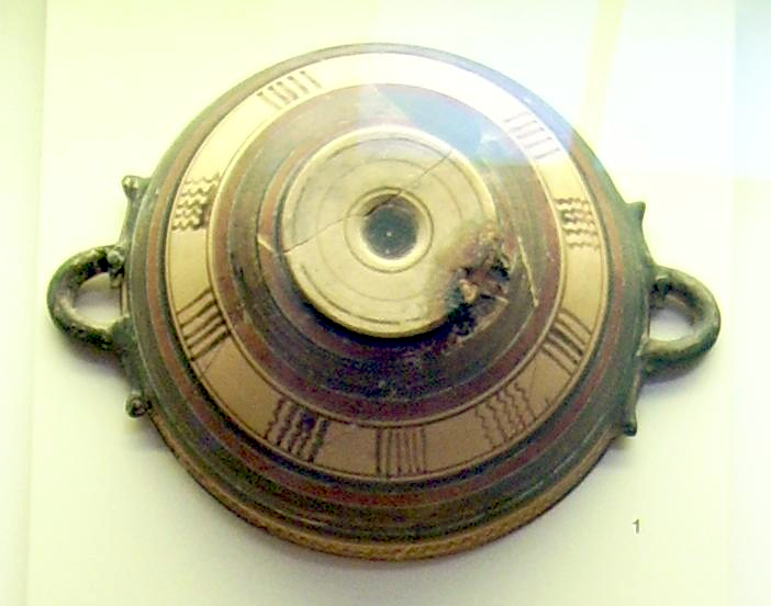 "Elische" Lopas (Kochgerät) im Museum von Olympia, Ende 7./Anfang 6. Jh. v. Chr.